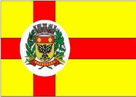 Bandeira do Município de Nhandeara, SP